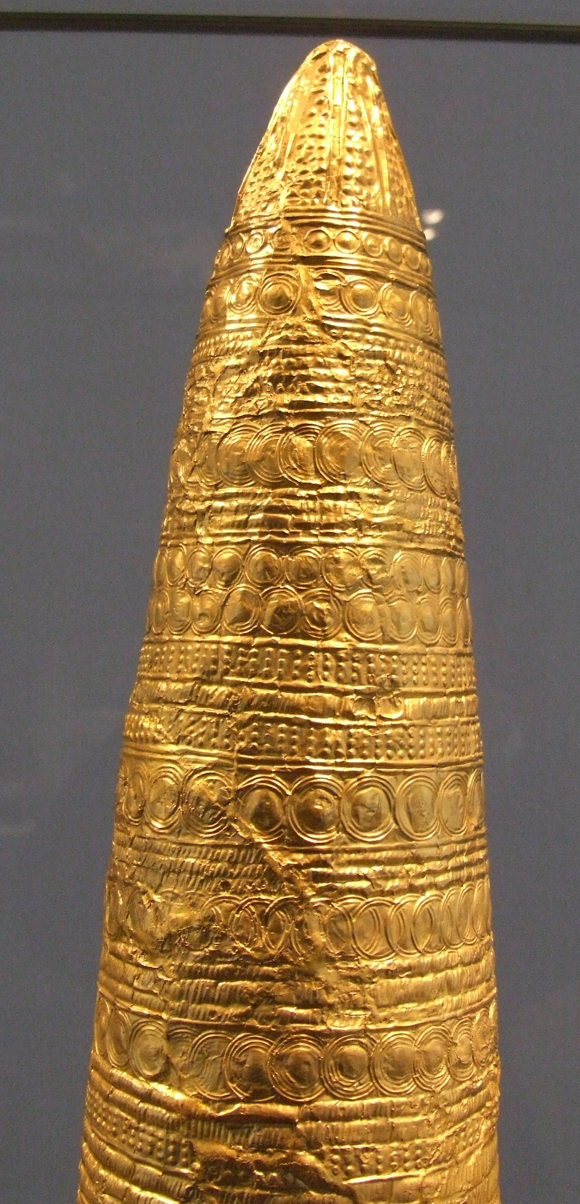 Goldblechkegel von Ezelsdorf-Buch - 1 - Spitze, Germanisches Nationalmuseum ( Nürnberg / Deutschland )